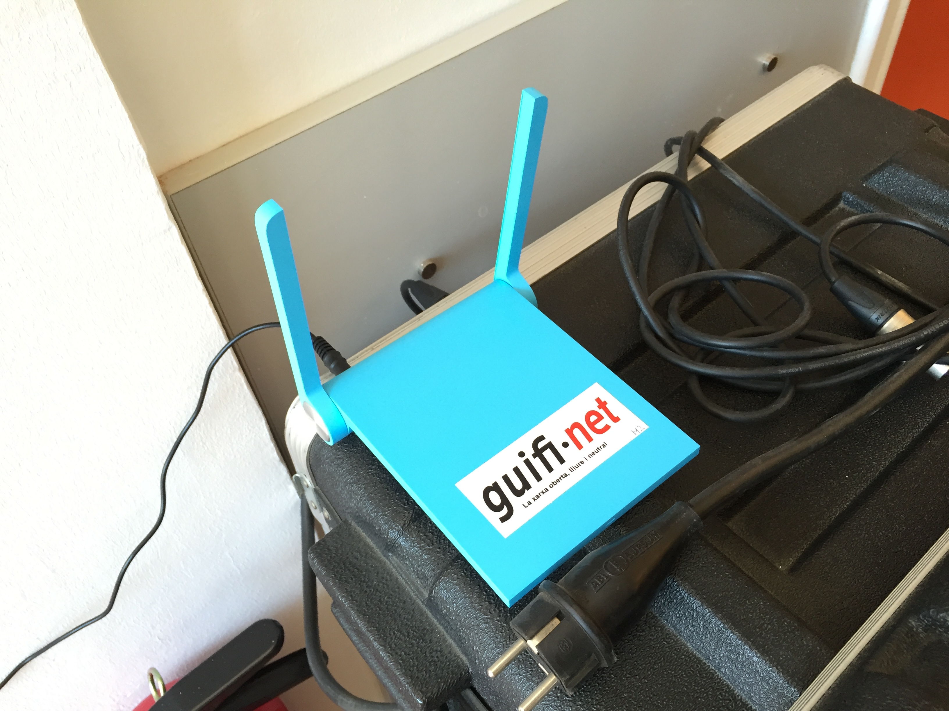 mòdem